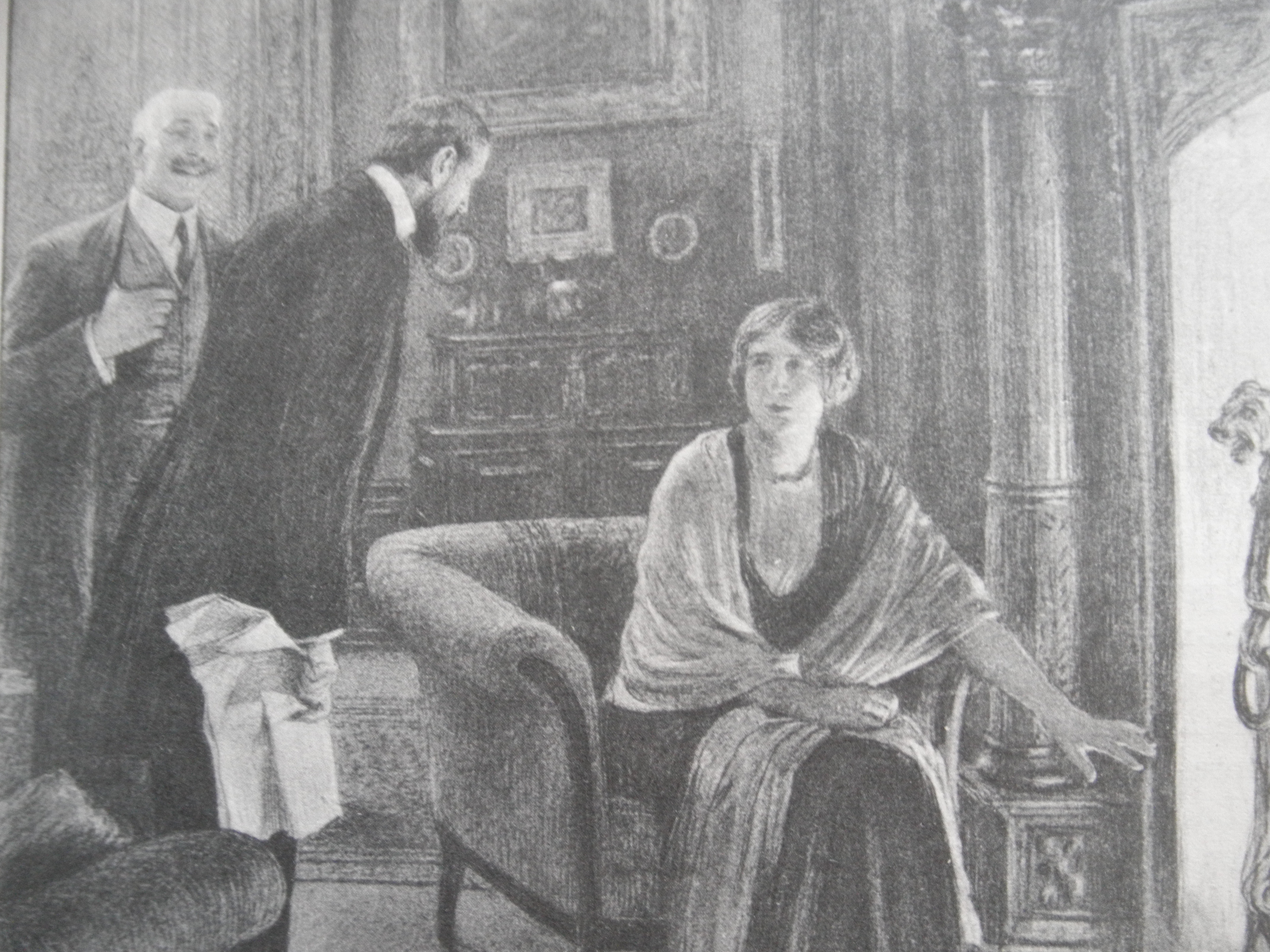 gravure 1914